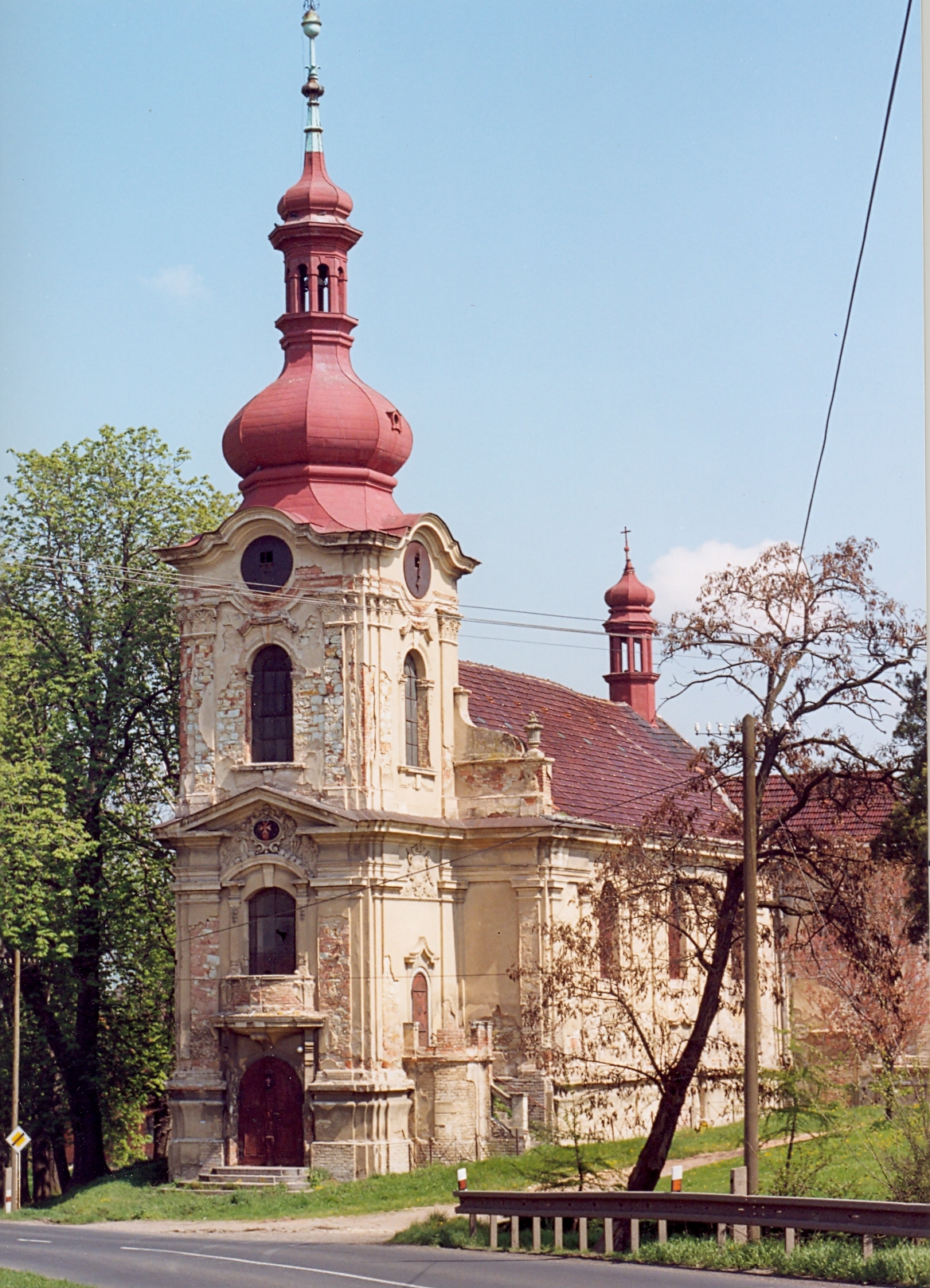 Kostel sv. Kříže a Všech svatých (Pšov), Pšov